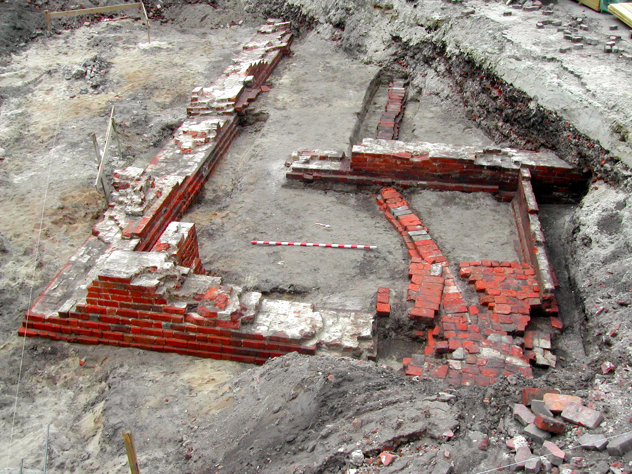 Der 2005 ergrabene Keller im WWestflügel des Dominikanerklosters in Norden.